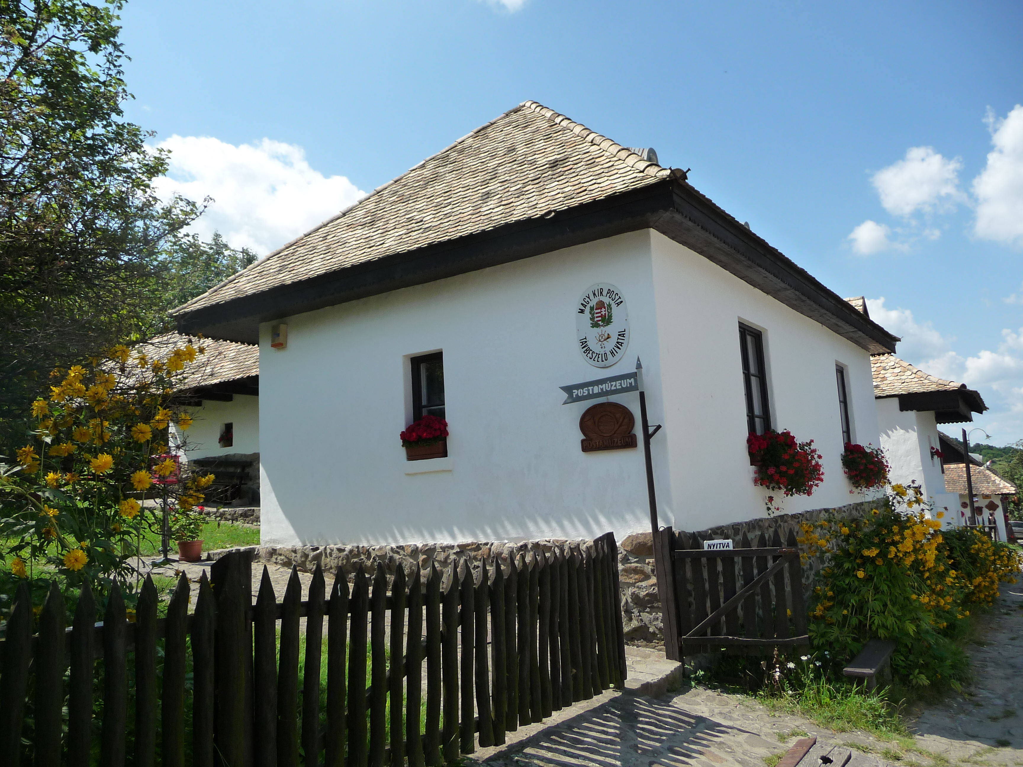 Hollókői postamúzeum, Kossuth út 80.